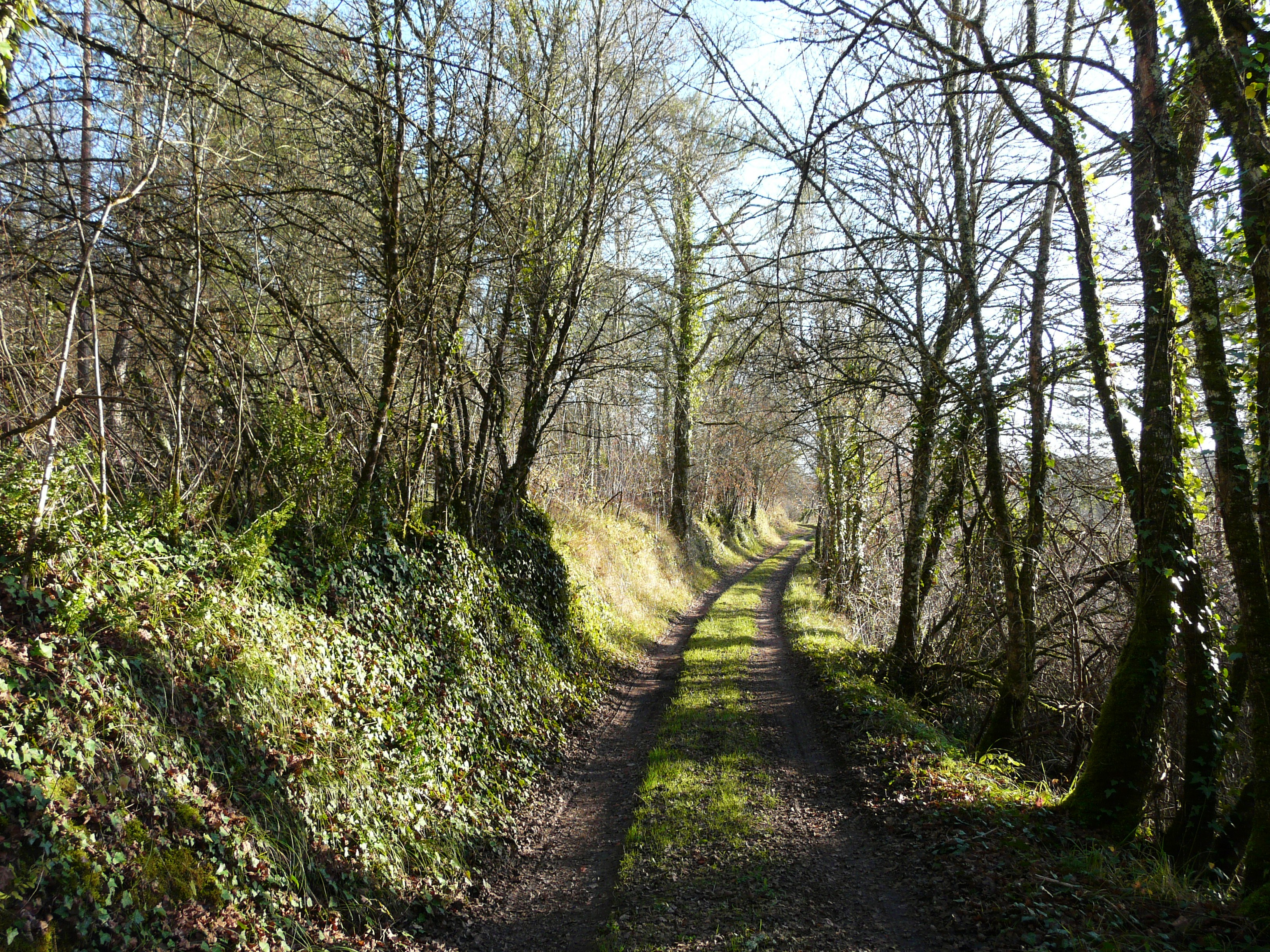 Fin d'automne sur le causse de Cubjac, Sarliac-sur-l'Isle, Dordogne, France